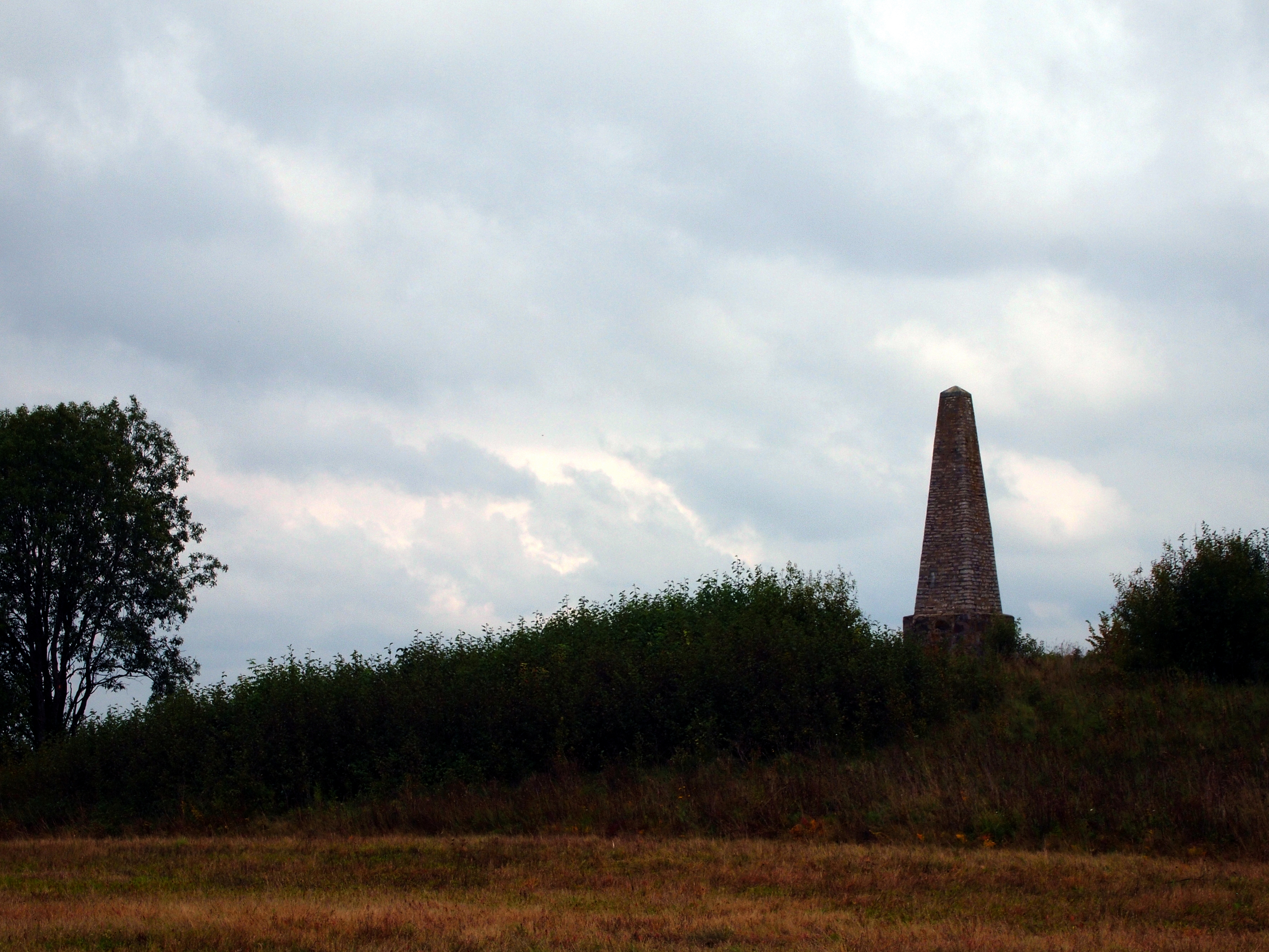 Monument Paide linna vallutamisel 1573. aastal langenud vene sõduritele.